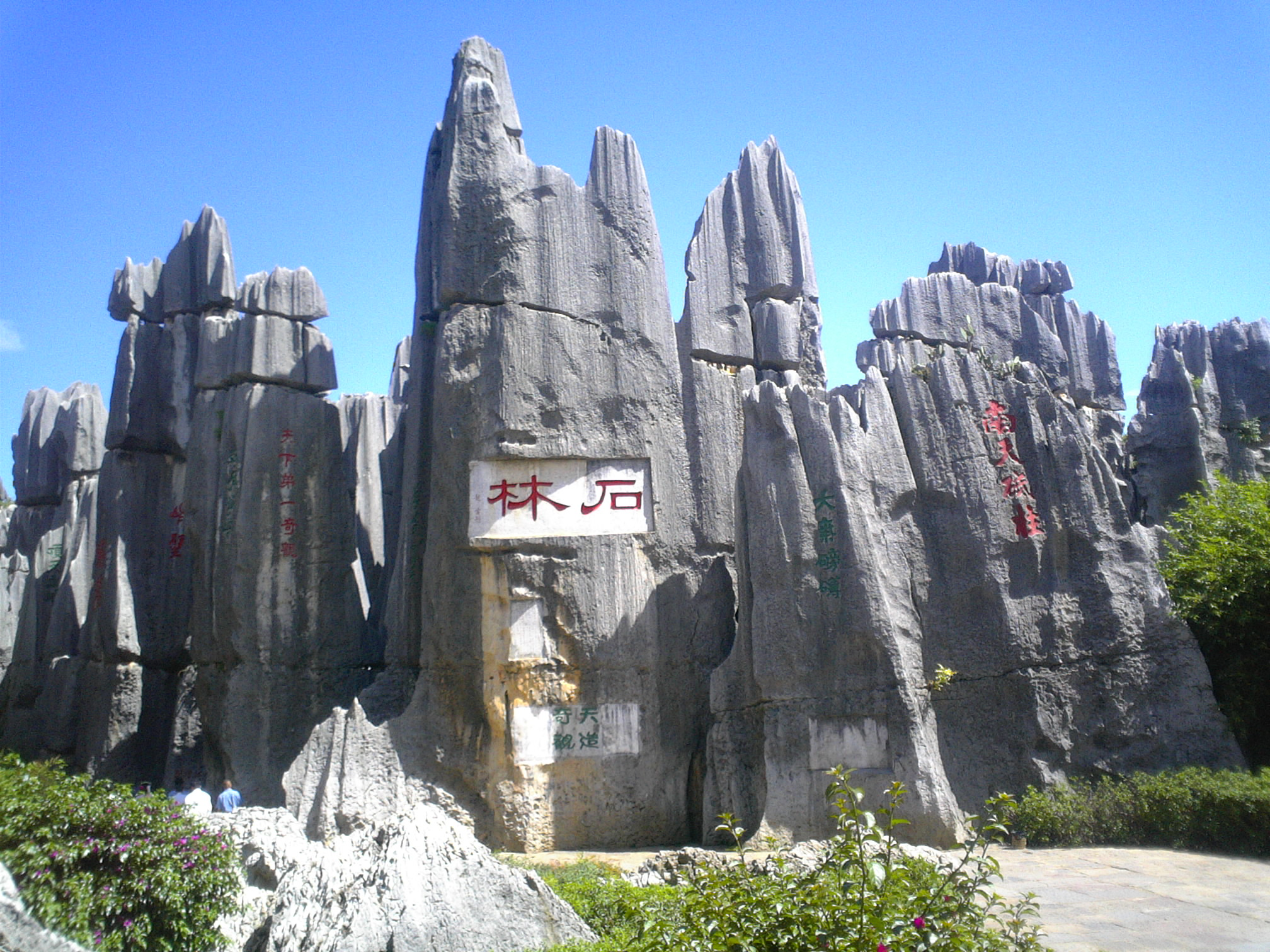 作者：陈昀